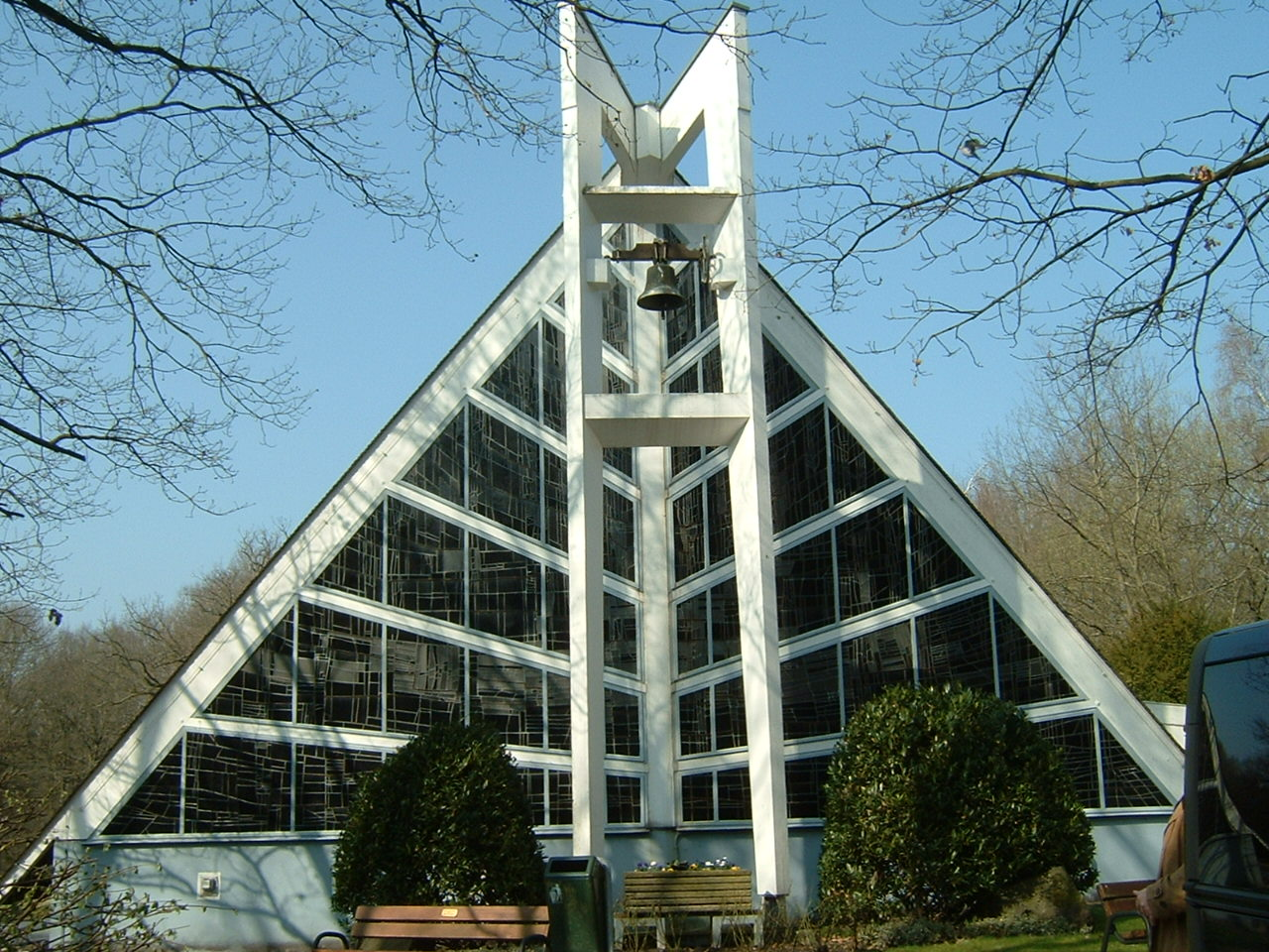 Trauerhalle Waldfriedhof in Schwalbach am Taunus